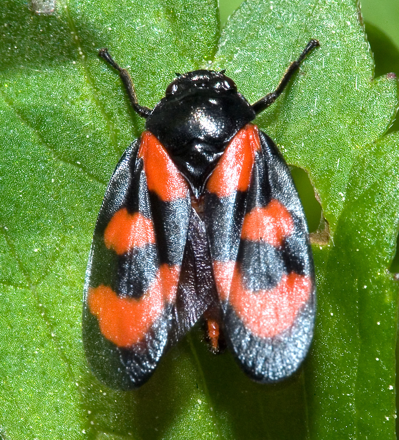 stridulierende Cercopis vulnerata Gemeine Blutzikade